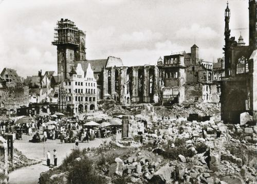 Das zerstörte und befreite Nürnberg im April 1945: Blick über den Hauptmarkt, von der Plobenhofstraße gegen Nordwesten auf St. Sebald gesehen.